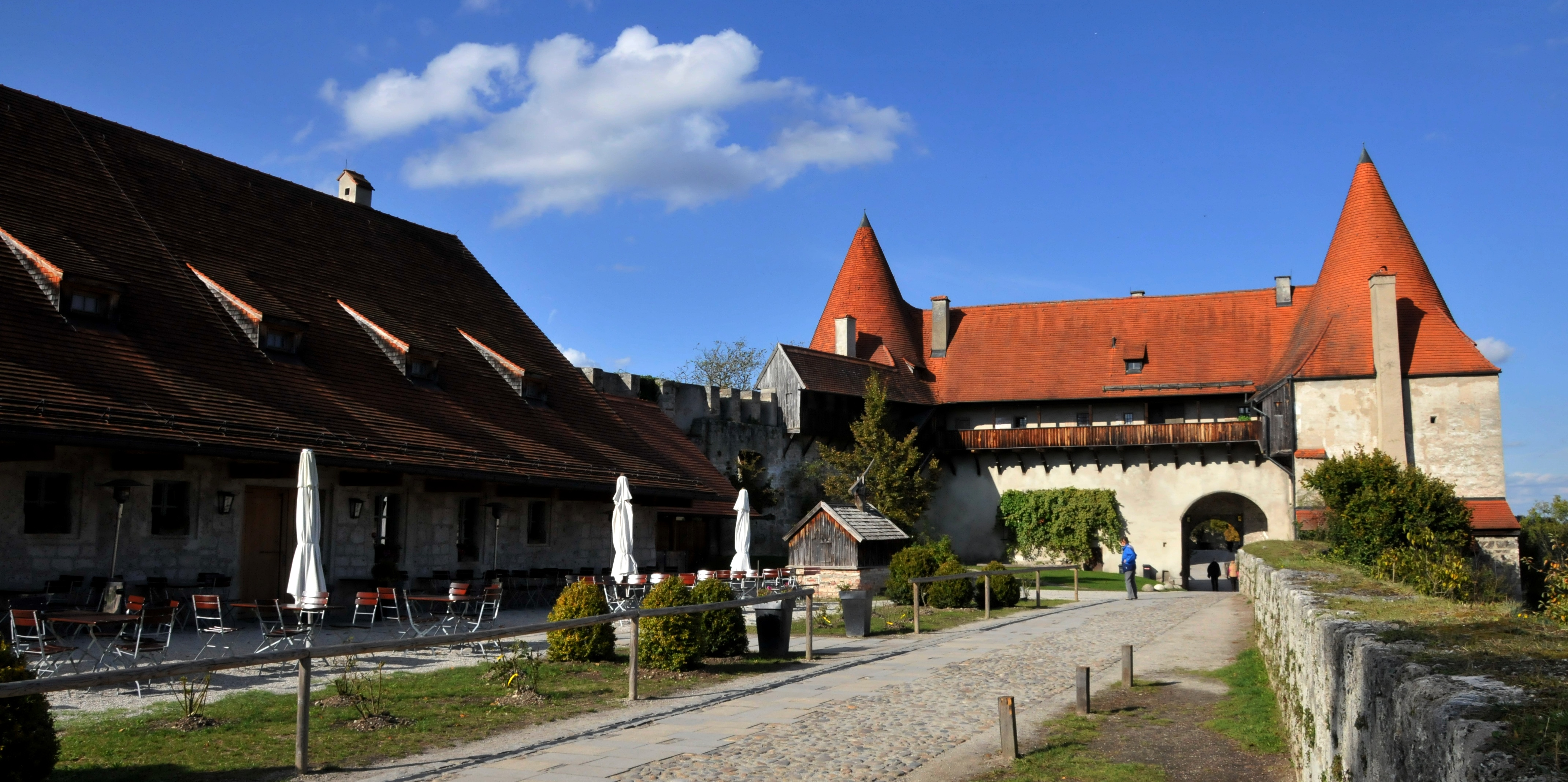 Burghausen, Burganlage, Georgstor